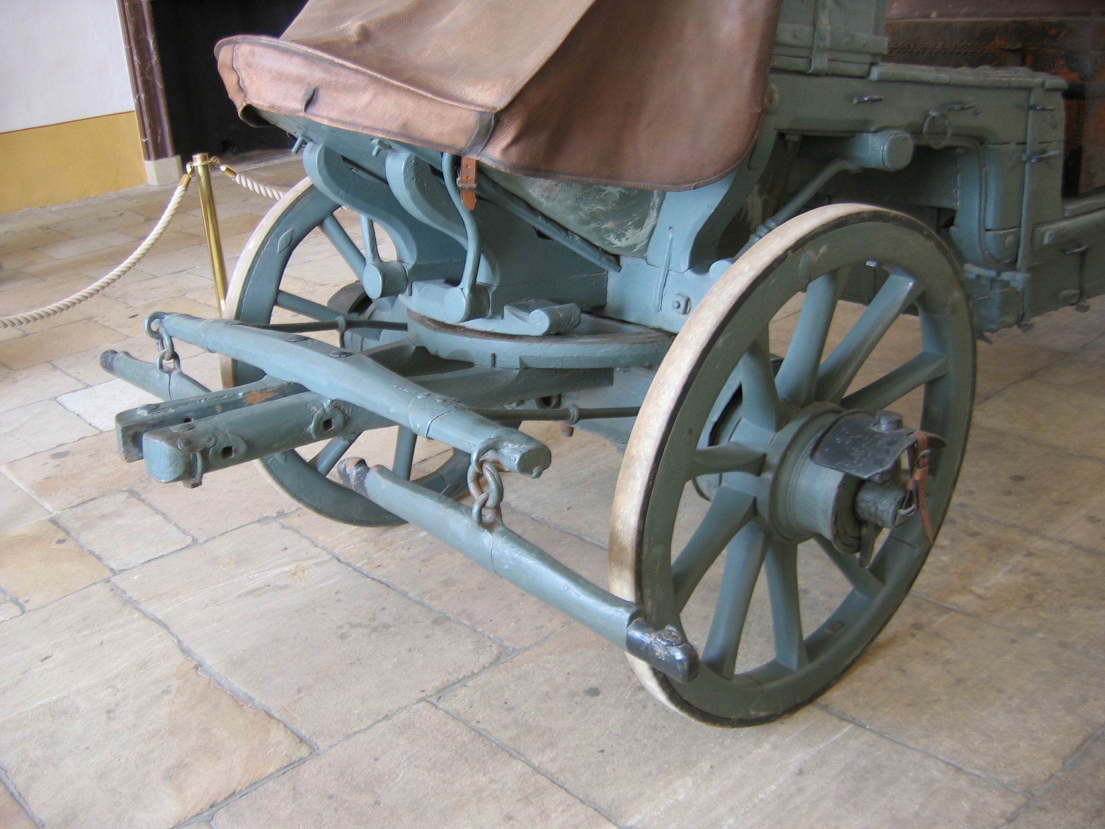 Speichenrad eine Kutsche von Anfang des 18. Jahrhunderts (vermutlich August der Starke), Schloß Moritzburg